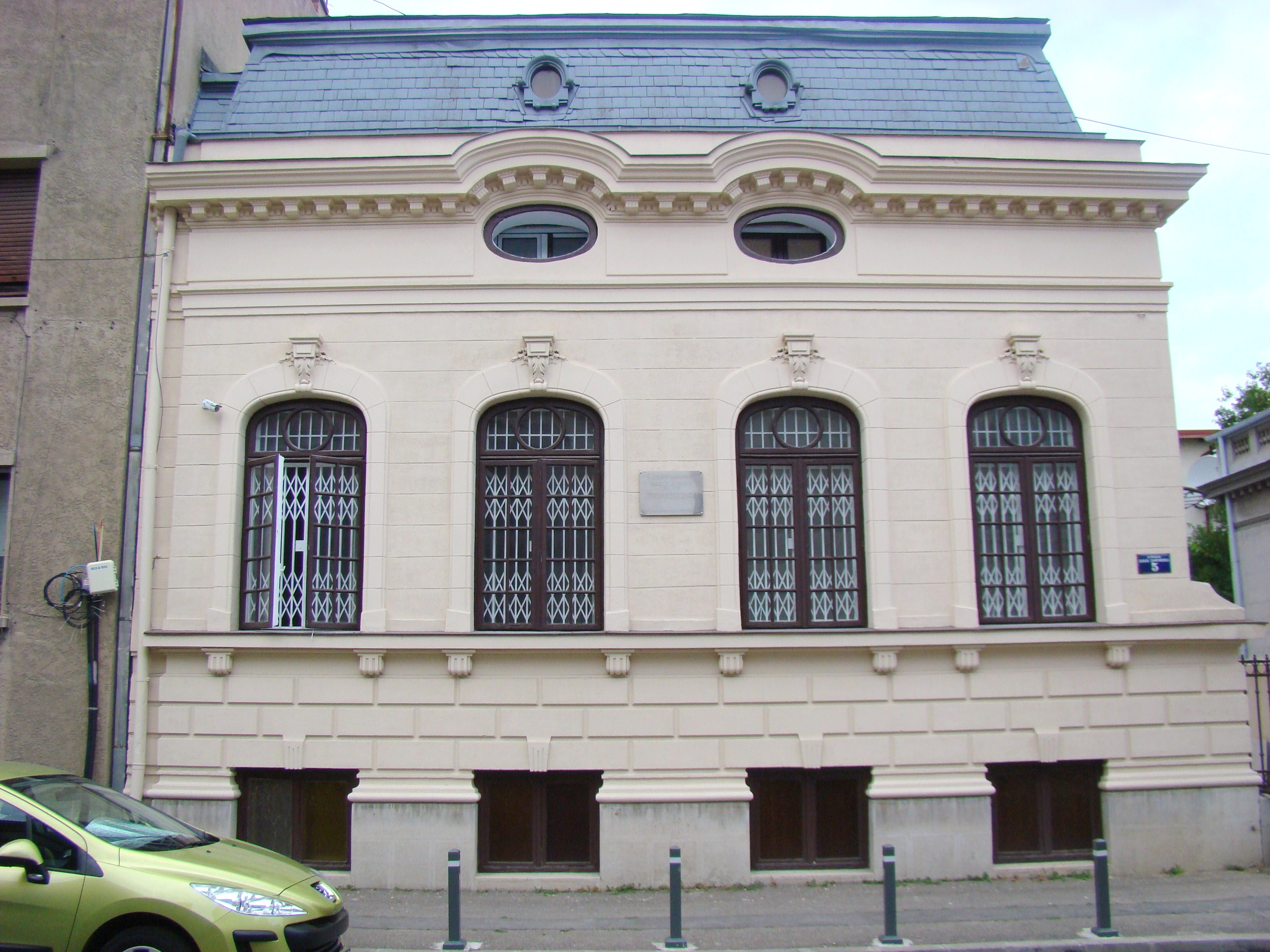 Clădire monument istoric, str. Duiliu Zamfirescu, nr.5